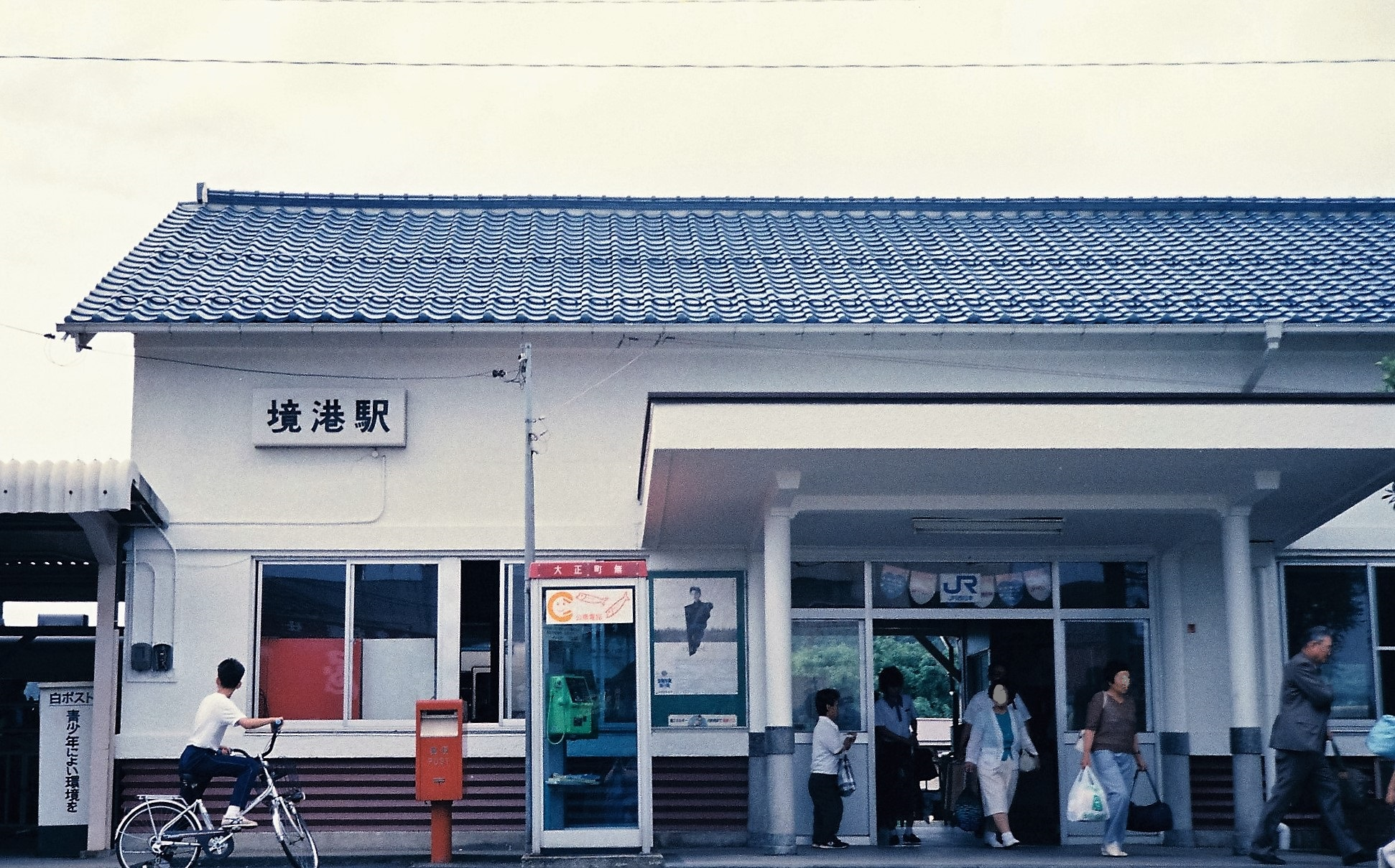 移転前の境港駅駅舎（1988年7月撮影）